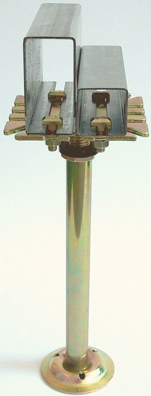 Schaltwartenstütze